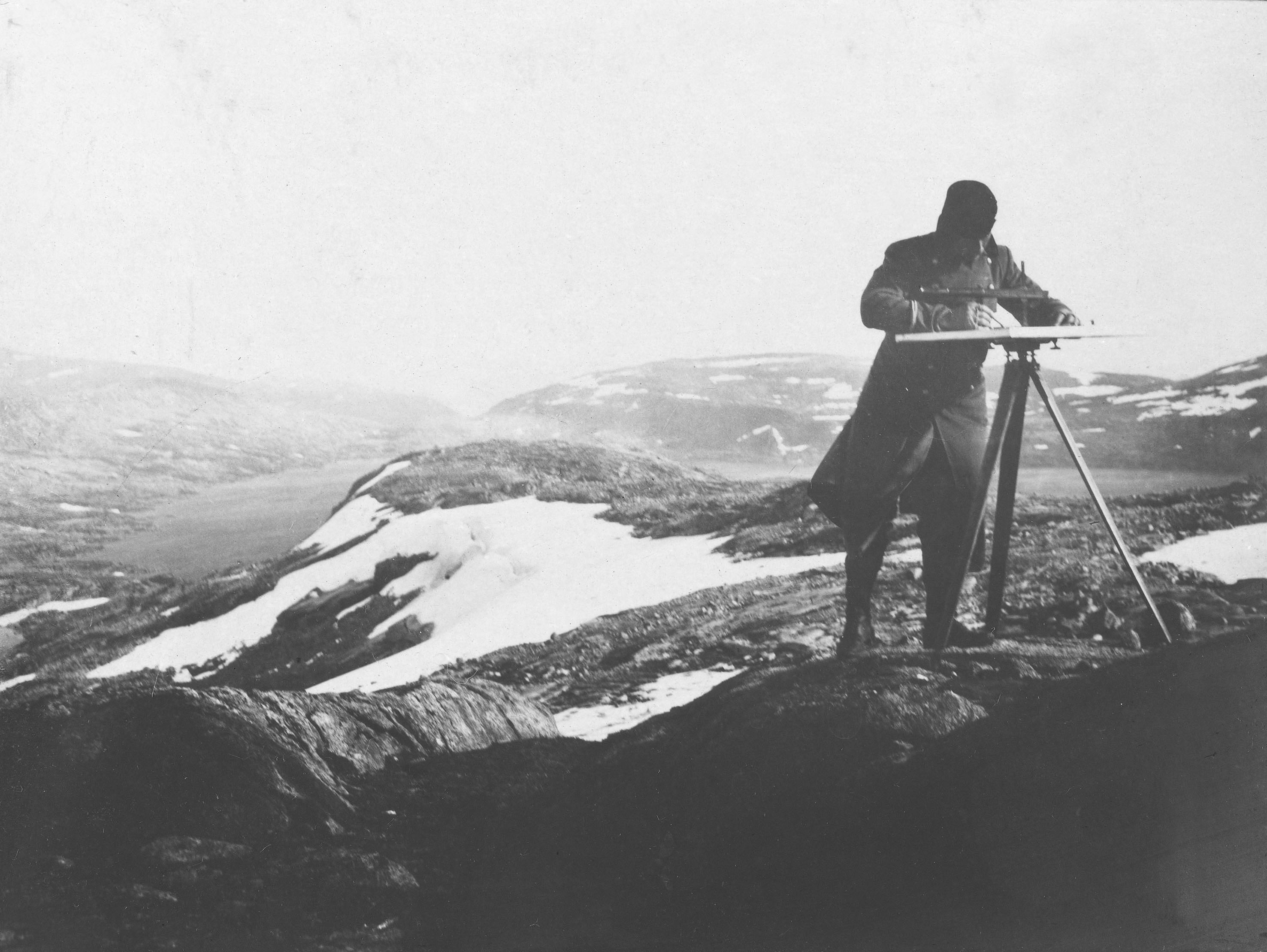 Topograf Munthe Kaas ca. 1906